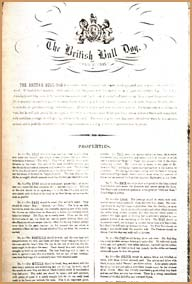 'Philo-Kuon' Standard.